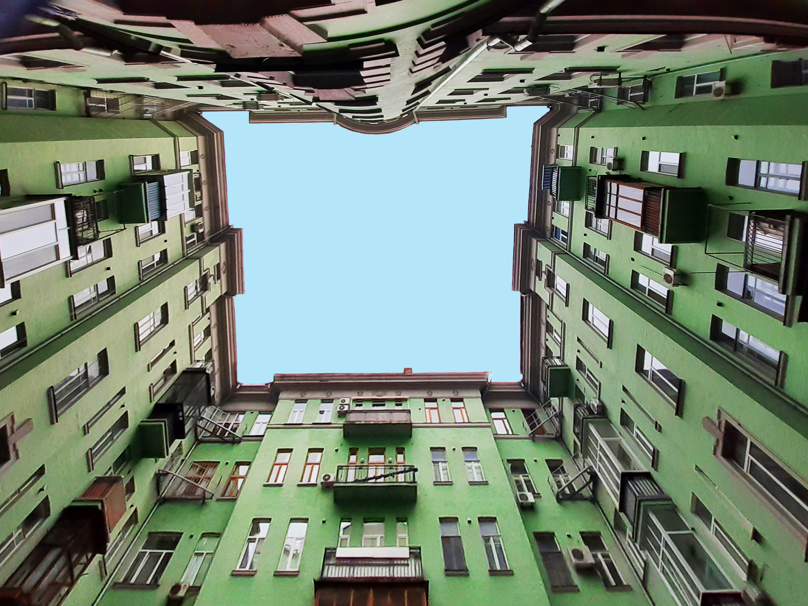 Будинок-колодязь (№ 13). Садиба Ханенків, Київ, вул. Терещенківська, 13